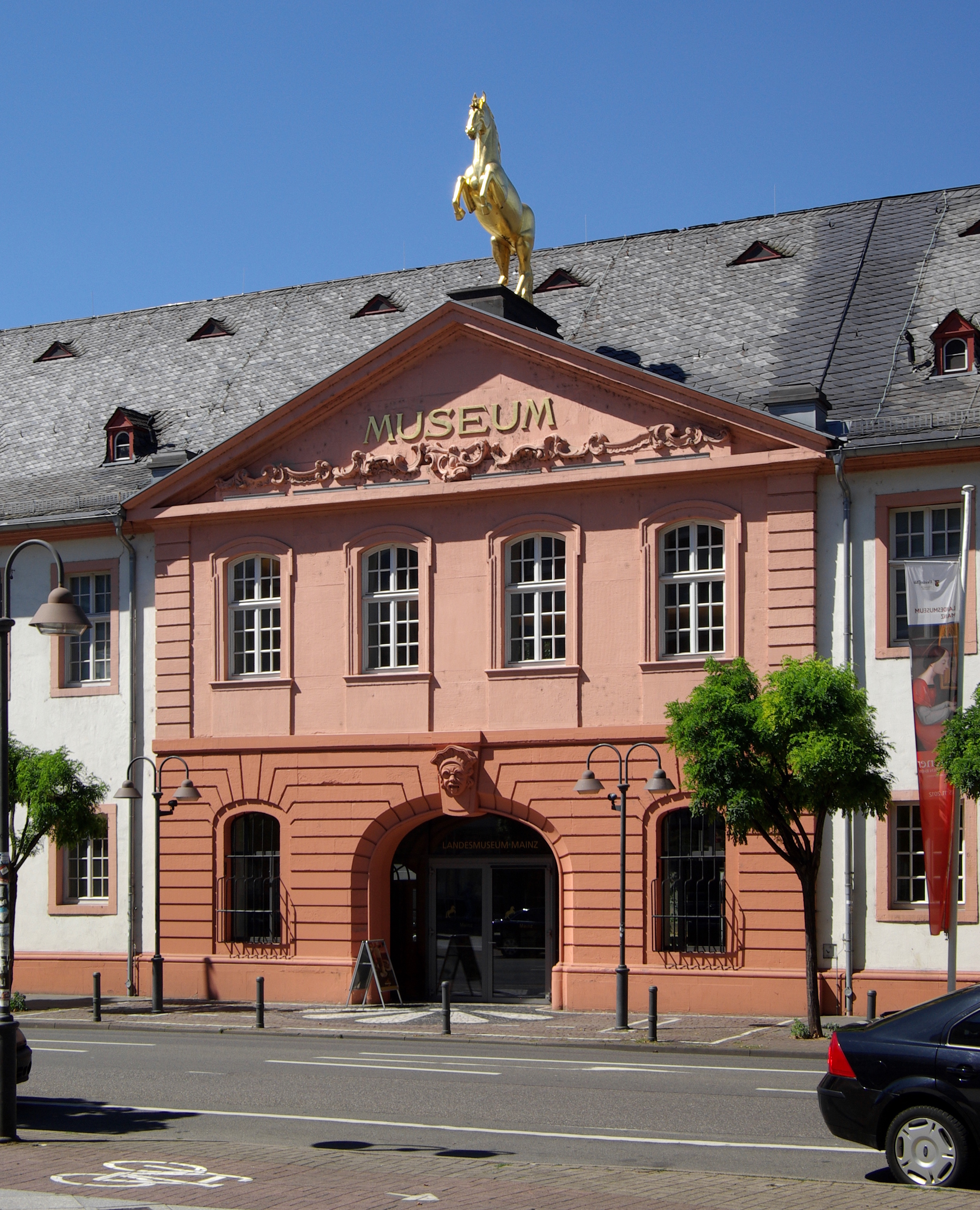 Mainz, Golden-Ross-Kaserne, heute Landesmuseum